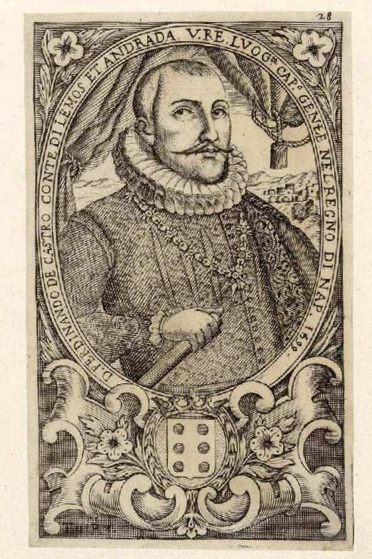 Fernando Ruiz de Castro Andrade y Portugal (1548-1601), conde de Lemos. Grabado calcográfico anónimo recogido en Teatro eroico, e politico de'governi de'Vicere del Regno de Napoli, de Domenico Antonio Parrino, Nápoles, 1692-1695.